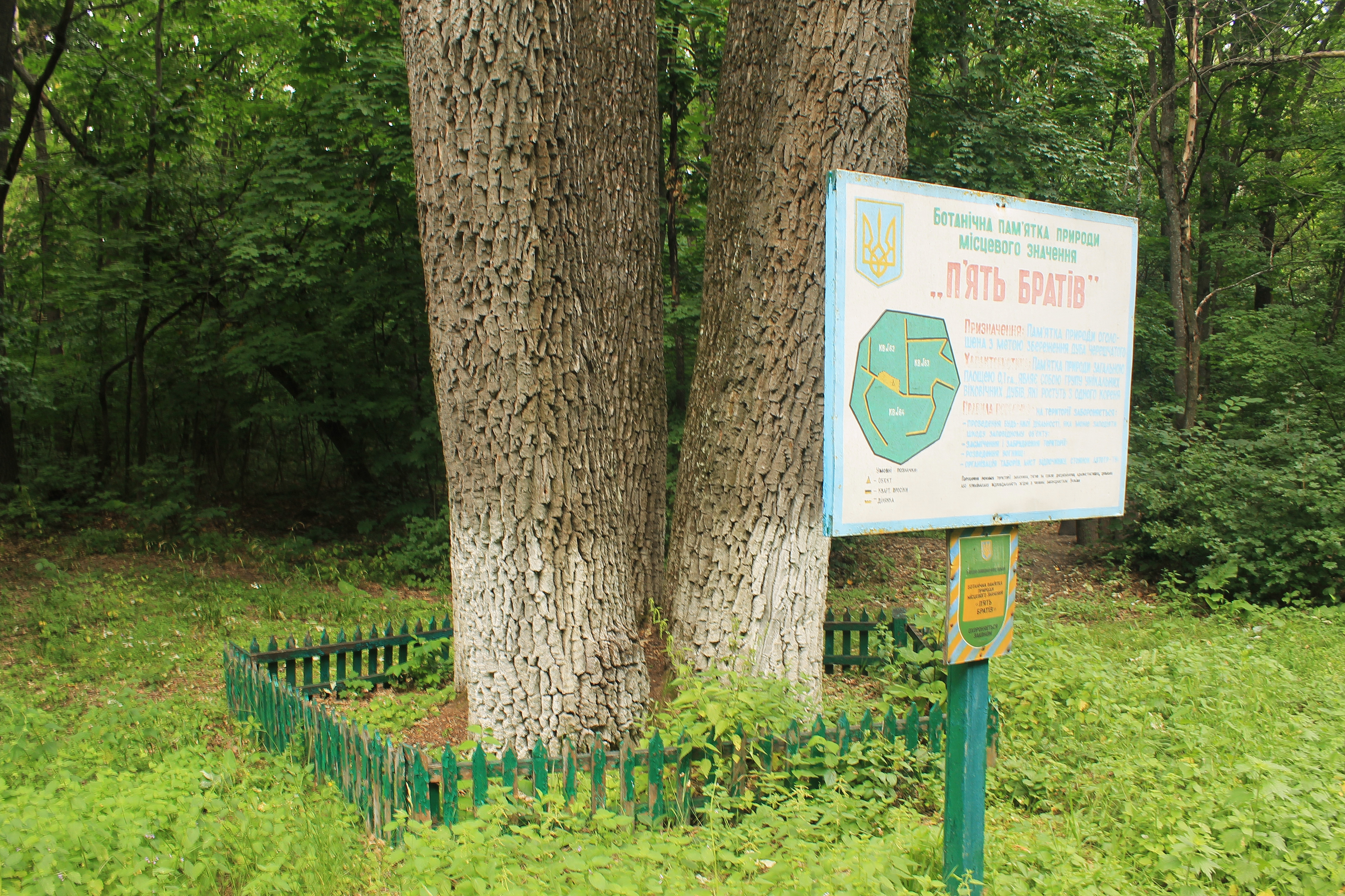 „П'ять братів“, Золочівський район Золочівське лісництво, Урочище Шапарське, кв. 62: вид. 7